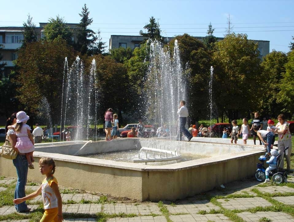 Havuzul (fontanul) din orasul Briceni